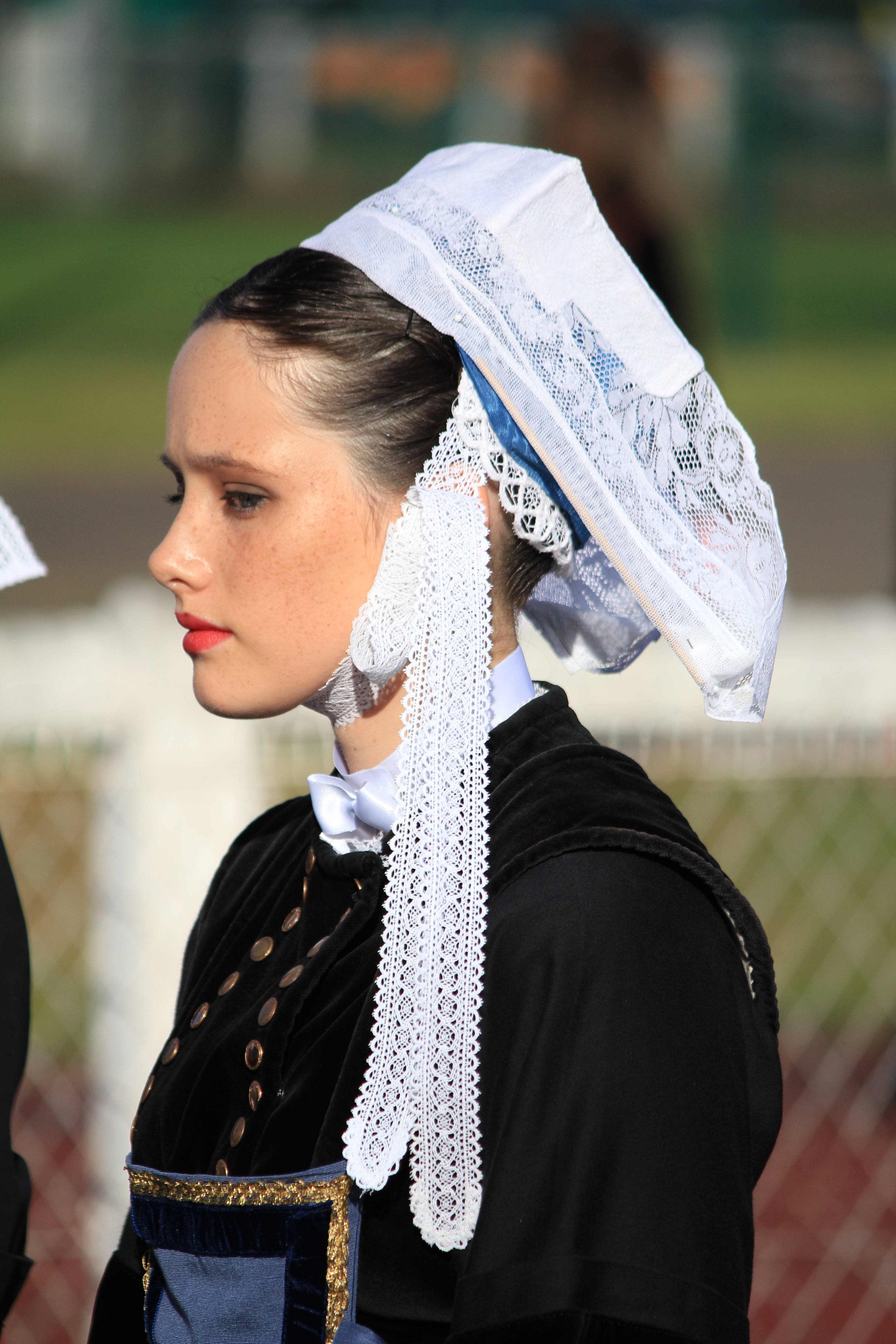 Cercle celtique Dañserien ar vro Pourlet lors de la grande parade du festival interceltique de Lorient 2013. Coiffe du pays Pourlet.